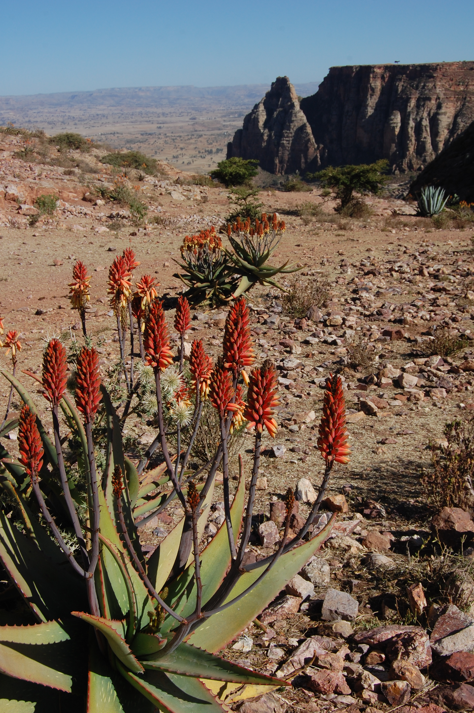 TESFA trek